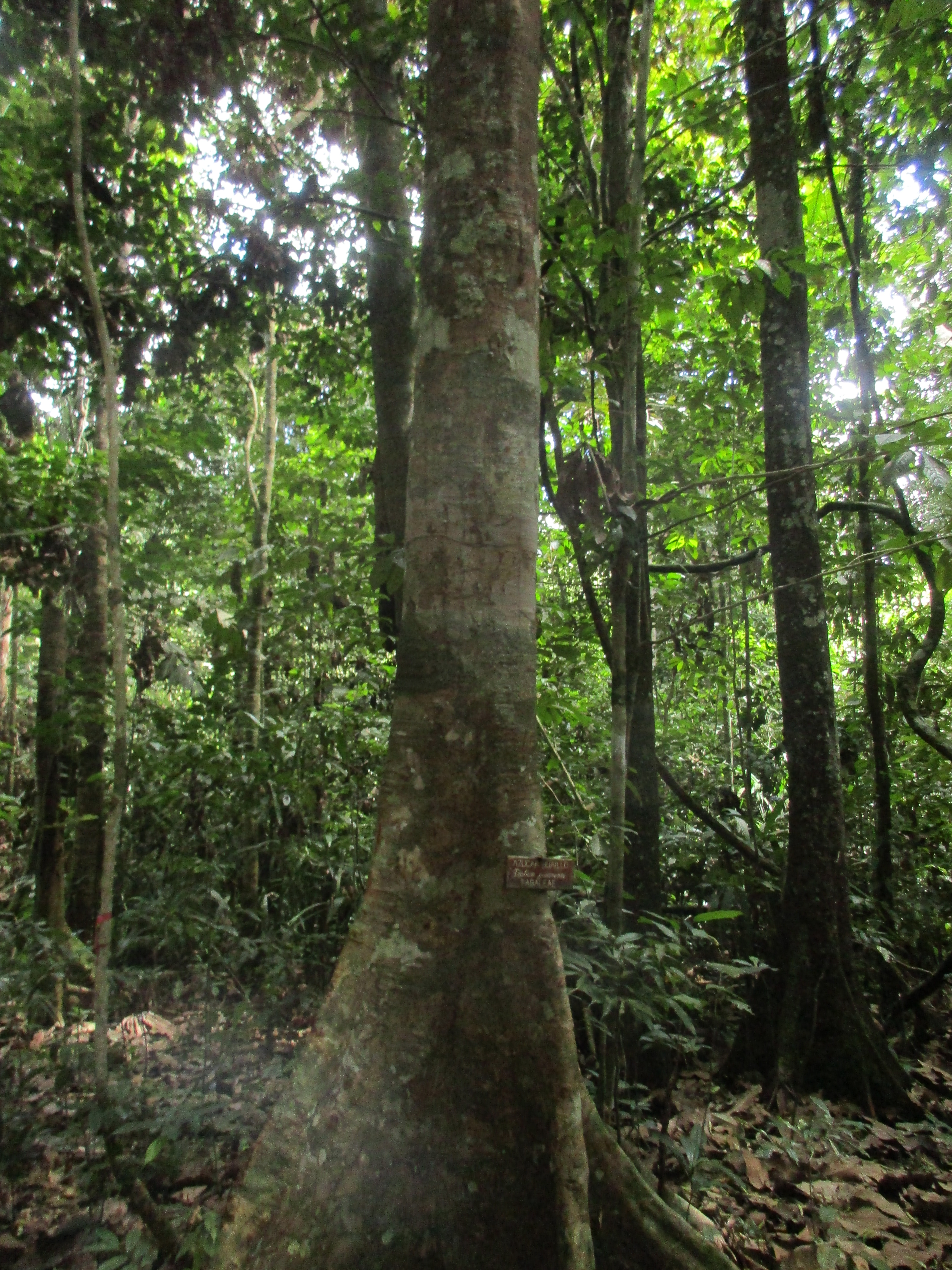 Un ejemplar de Hymenaea oblongifolia en la reserva nacional Allpahuayo Mishana, Loreto, Perú.